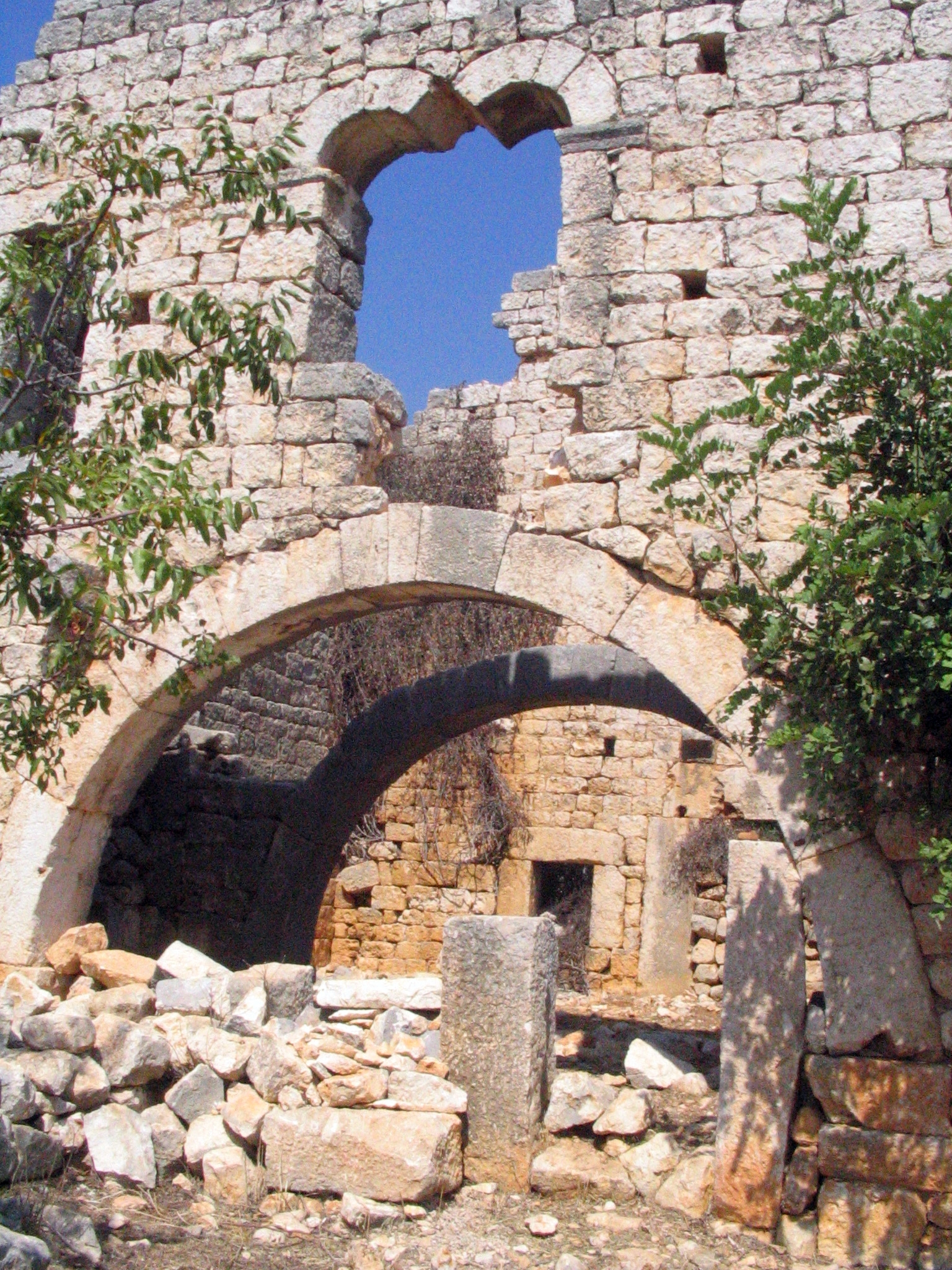 Karakabaklı, byzantinische Stadt in der Südtürkei